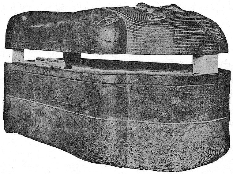 Sarcophage d'Eshmounazar, roi de Sidon, au Musée du Louvre.